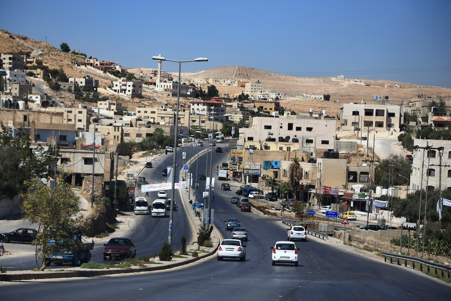 Qurtobah, Az-Zarqa, Jordan